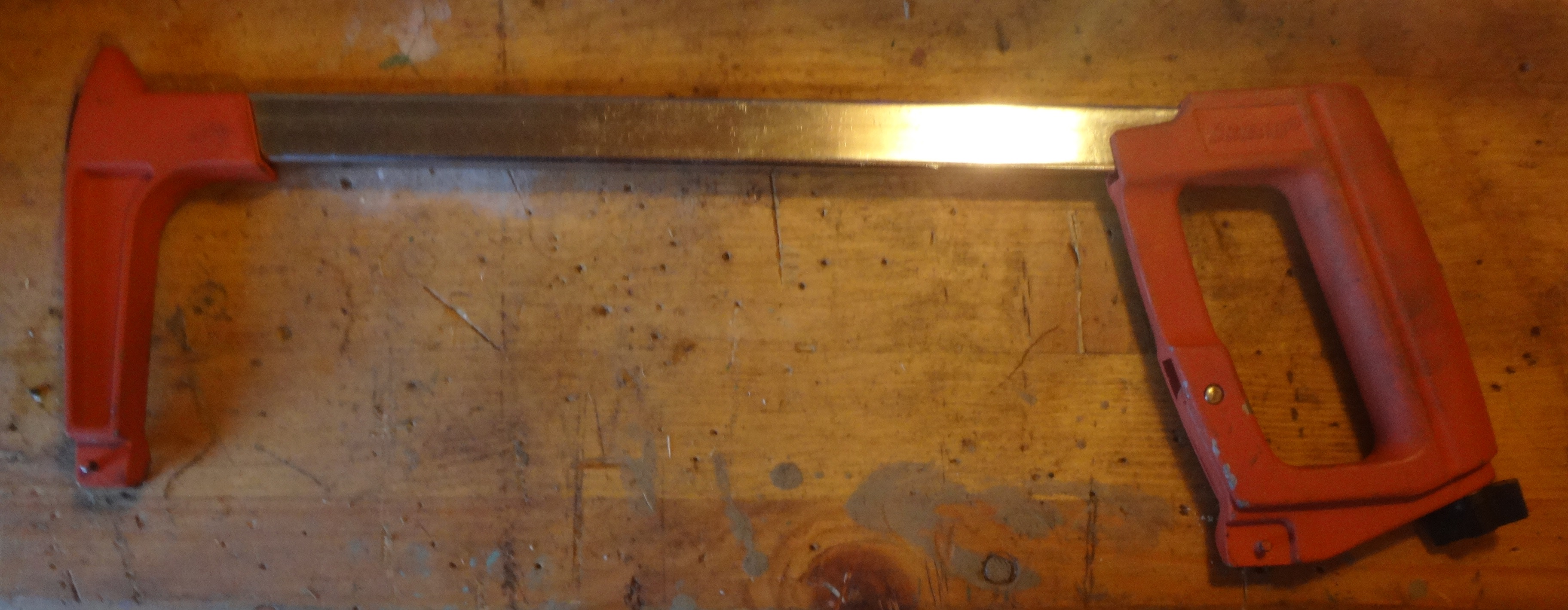 Ножовочная рамка